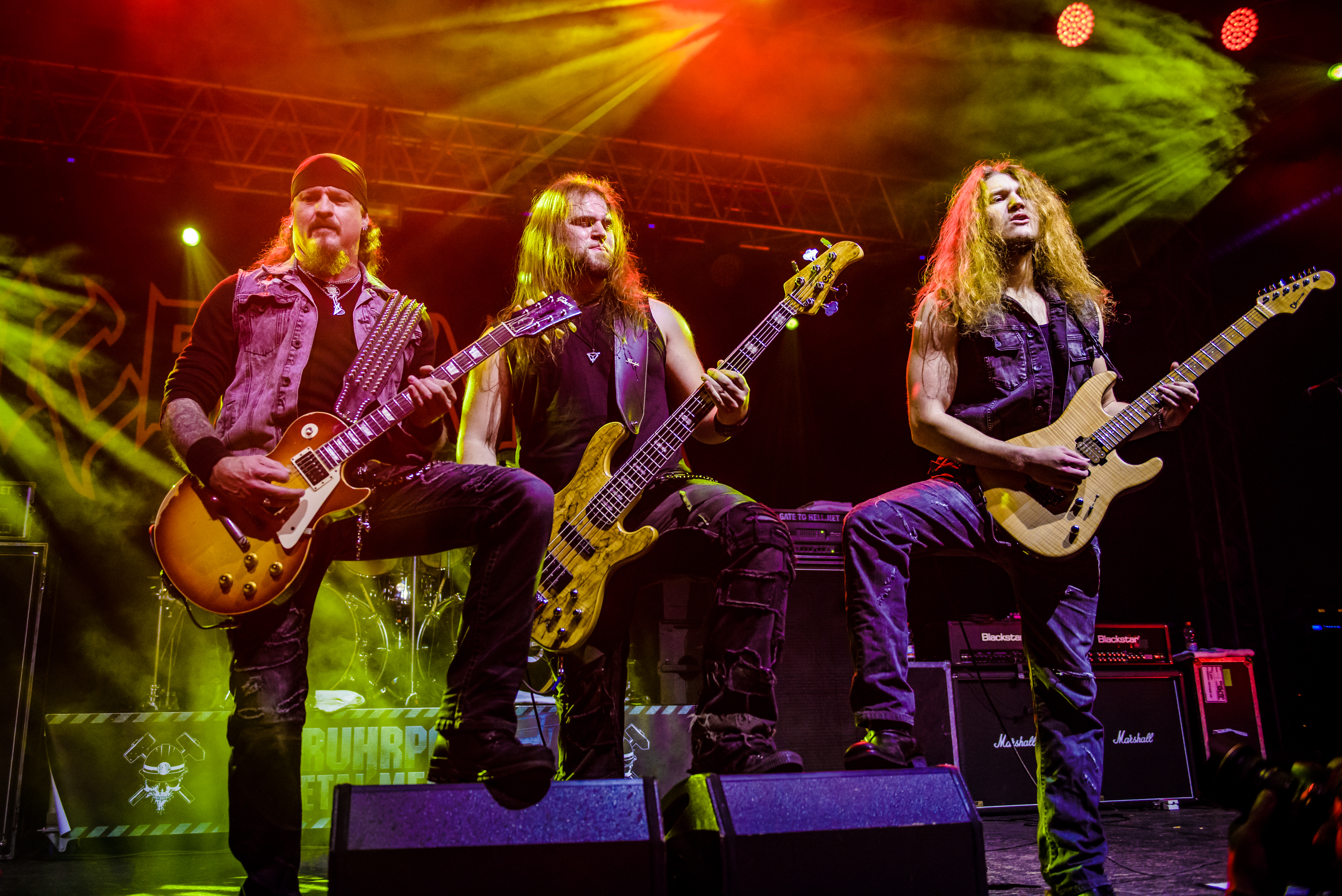 'Ruhrpott Metal Meeting 2016; Oberhausen Turbinenhalle': 'Iced Earth '